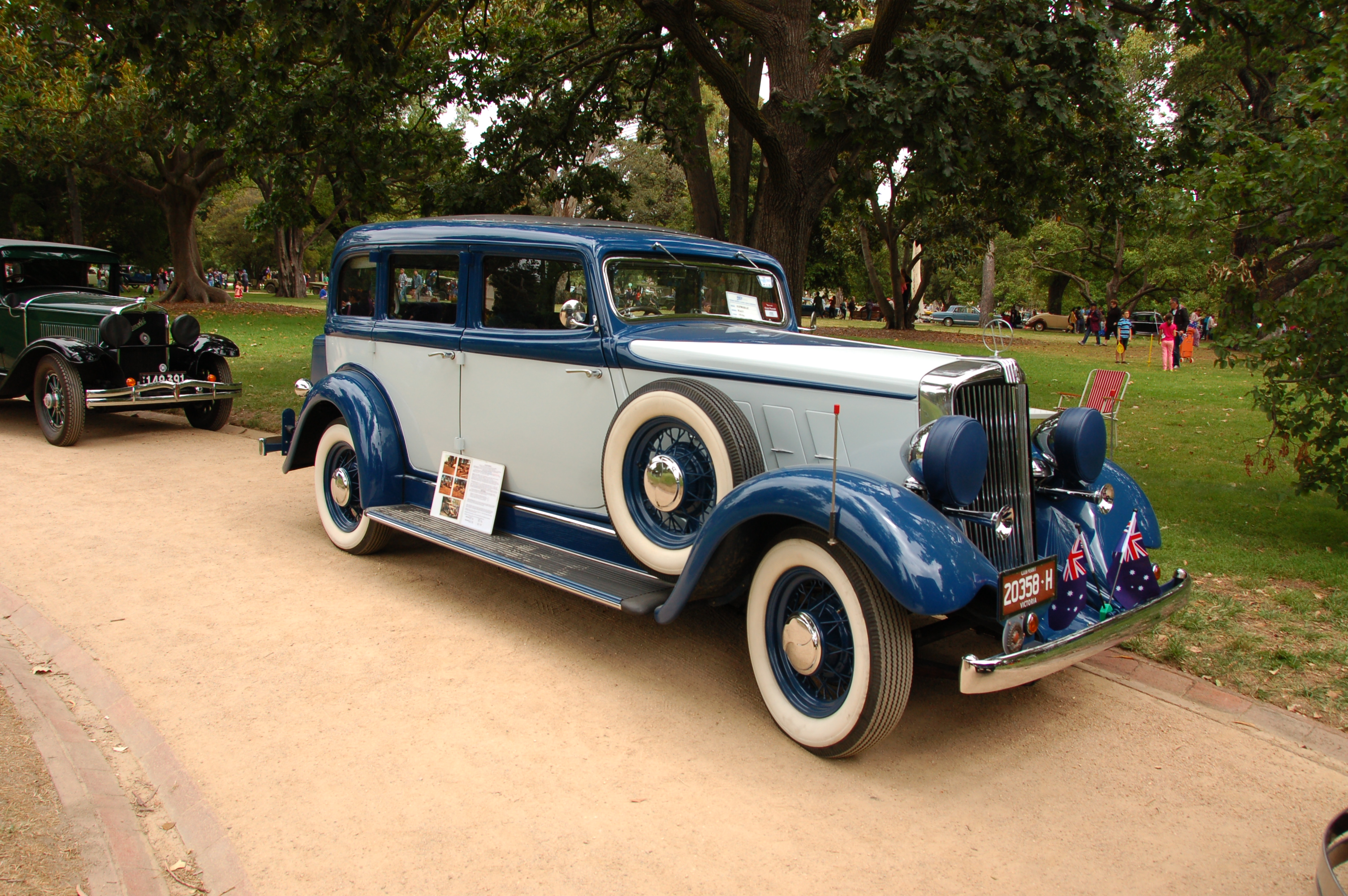 Hupmobile